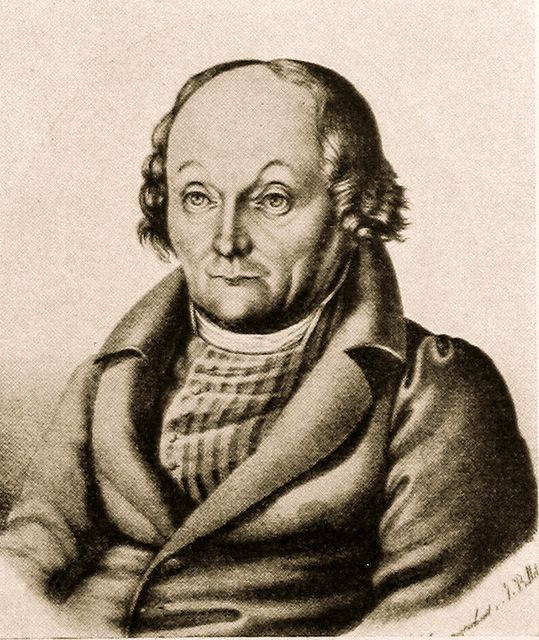 Hans Georg Nägeli (* 26. Mai 1773; † 26. Dezember 1836)